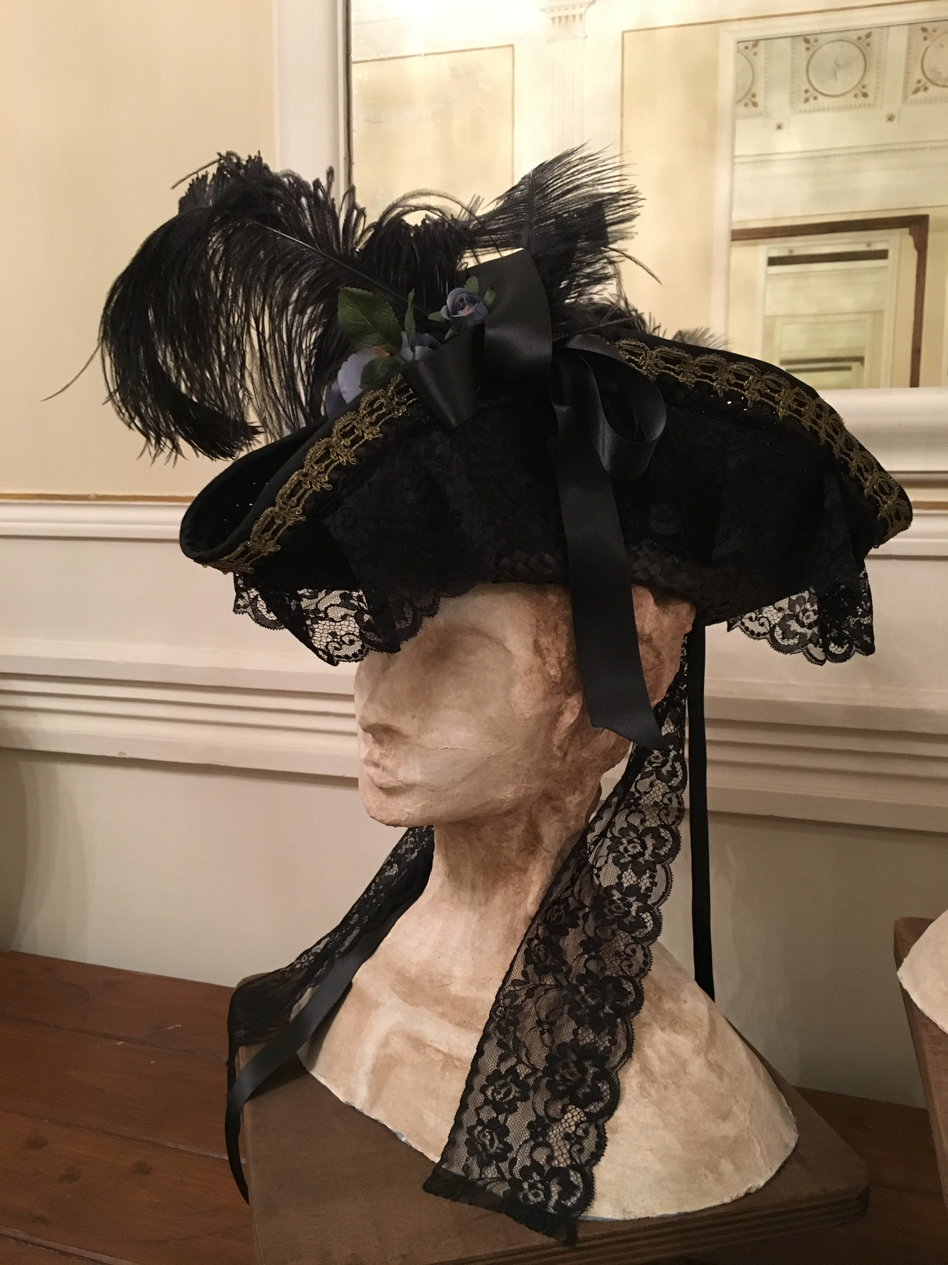 Tricorno